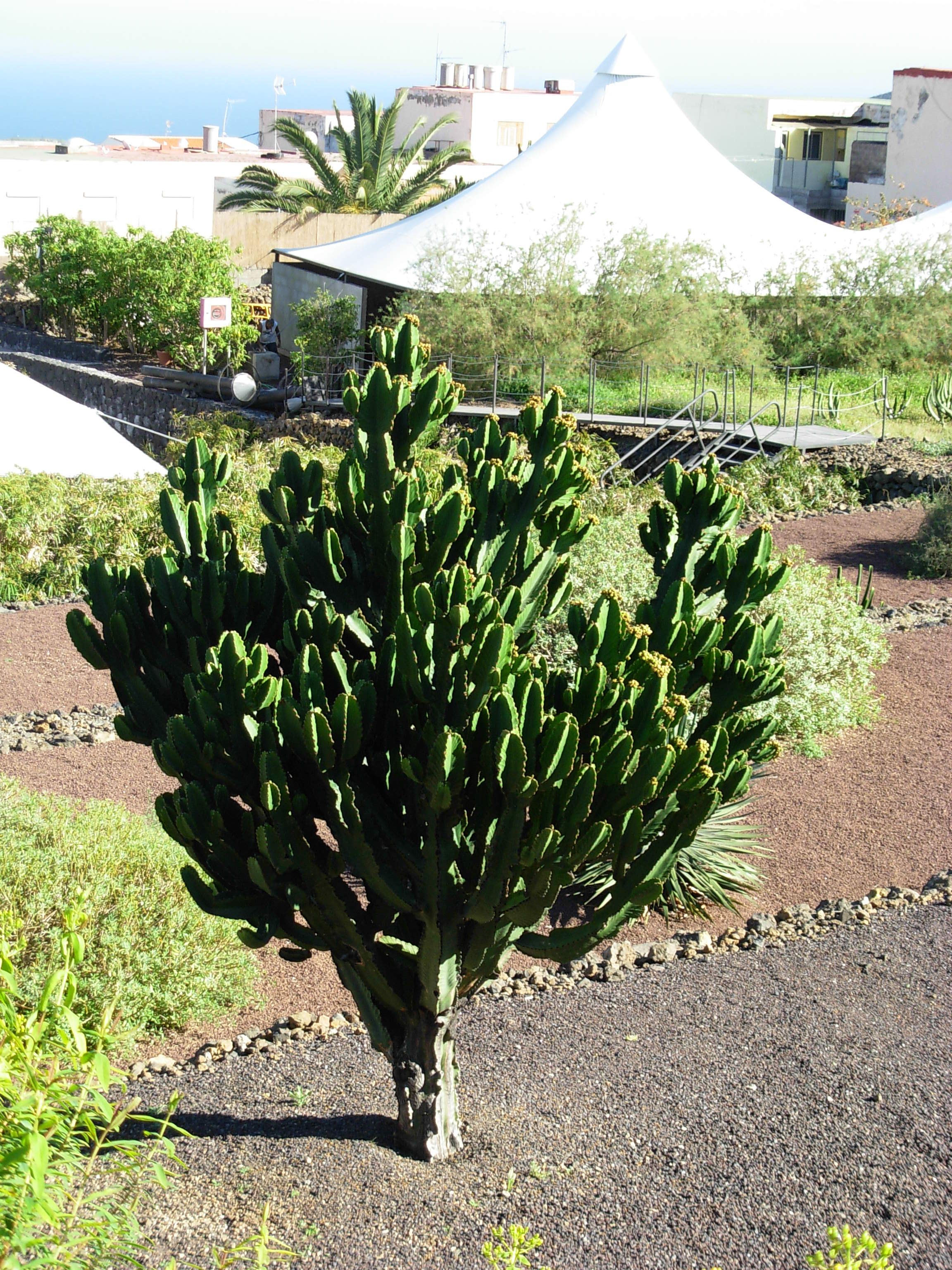 Plants. Güímar